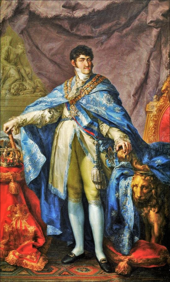 Retrato del rey Fernando VII de España (1784-1833) con el manto de la Orden de Carlos III, que fue fundada por su abuelo, el rey Carlos III de España, en 1771.